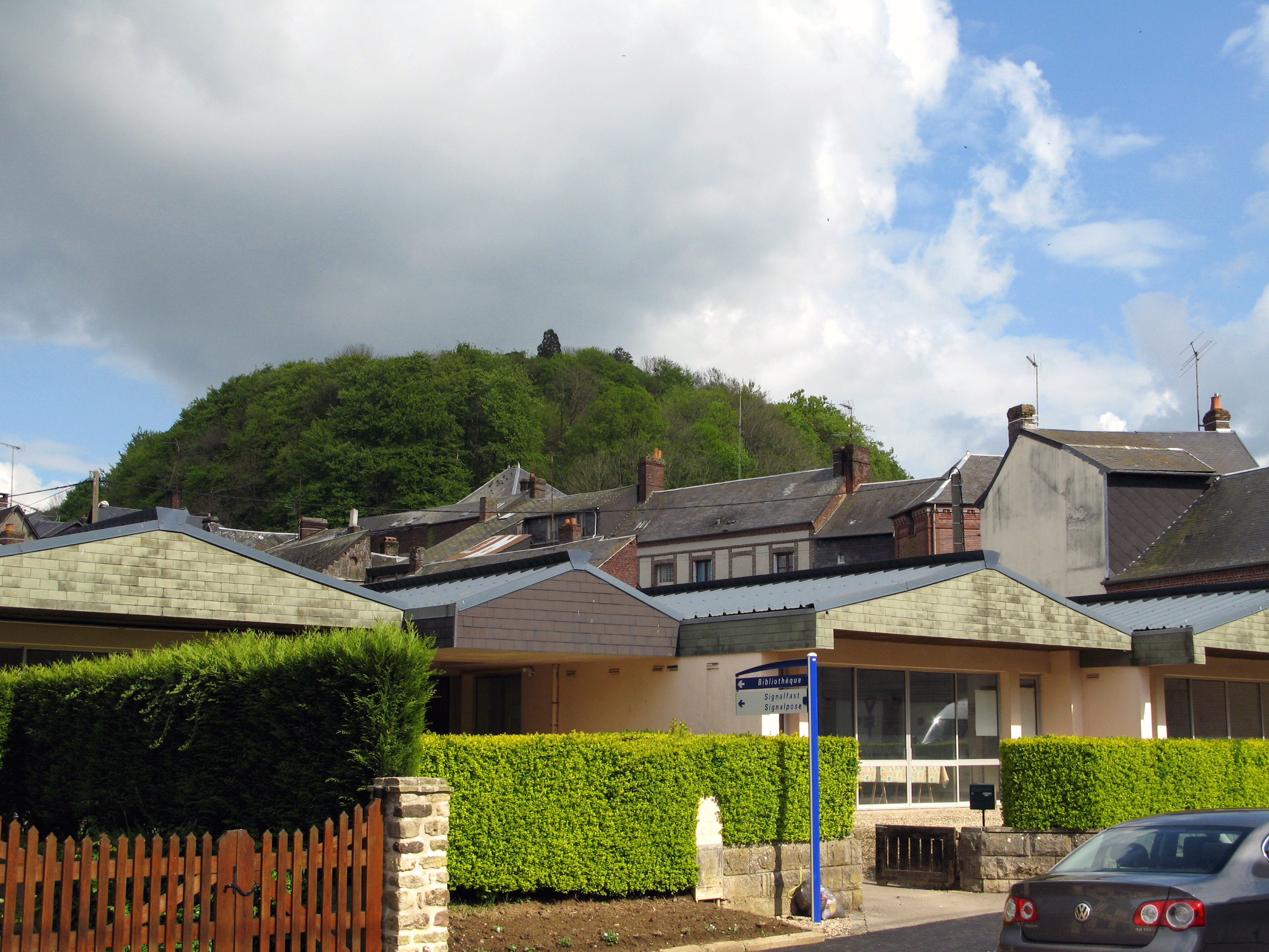 Gaillefontaine (Seine-Maritime, France) - Vue de la motte castrale depuis la rue Martin d’Aubermesnil. Un panneau désigne la "Bibliothèque municipale". .